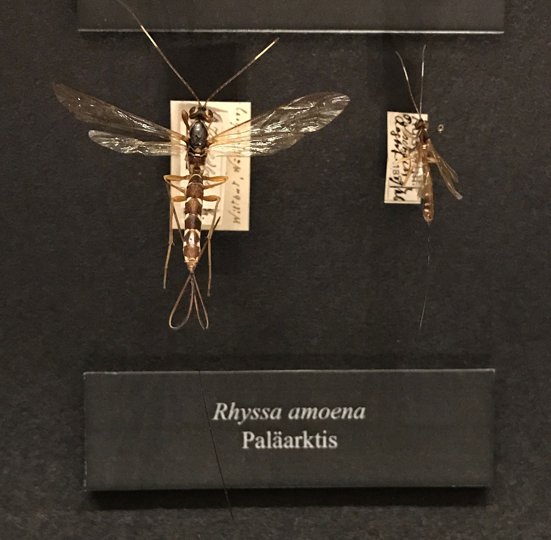 Präparat des Naturhistorischen Museums Wien Exhibit of the Museum of Natural History in Vienna